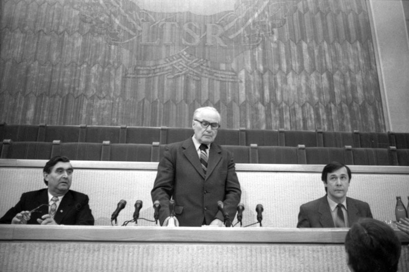 AT plenarinių posėdžių salėje Prezidiume respublikinės rinkiminės komisijos pirmininkas Juozas Bulavas (centre) ir nariai Viktoras Rinkevičius (kairėje), Vaclovas Litvinas (dešinėje)